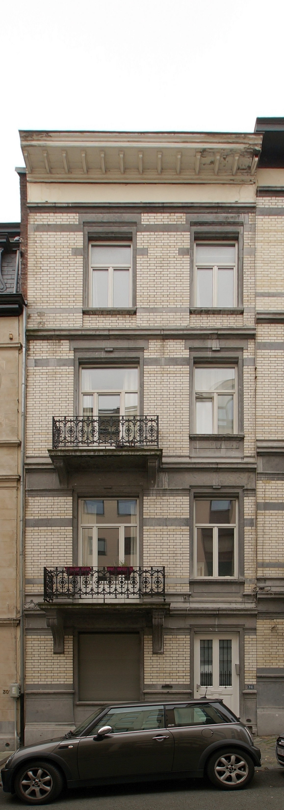 Elsene, Meerstraat 32 - Eclectische stijl (architect Franz Tilley) (1902)